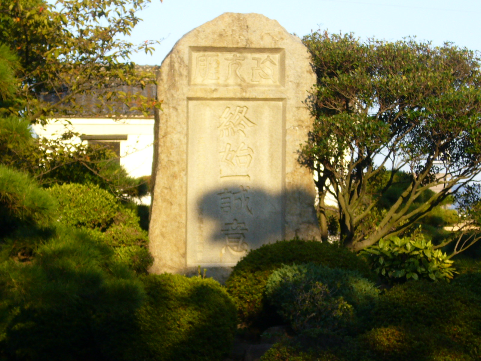 丸亀高校校訓碑